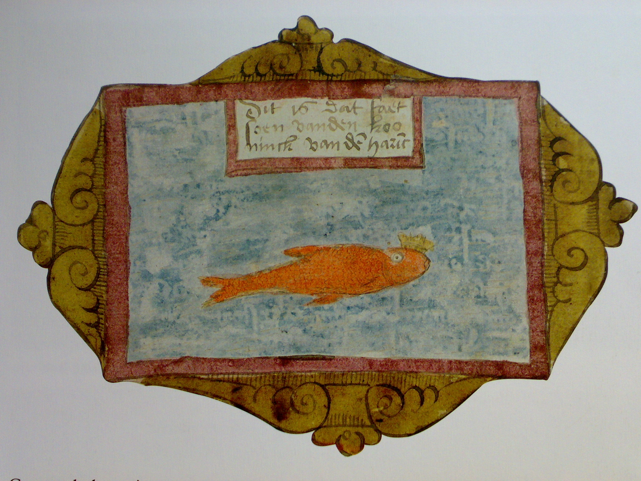 Afbeelding van een zogenoemde haringkoning (Mullus surmuletus) in het Visboek van Adriaen Coenen, (Koninklijke Bibliotheek Den Haag hs.78 E. 54 fol.25r)